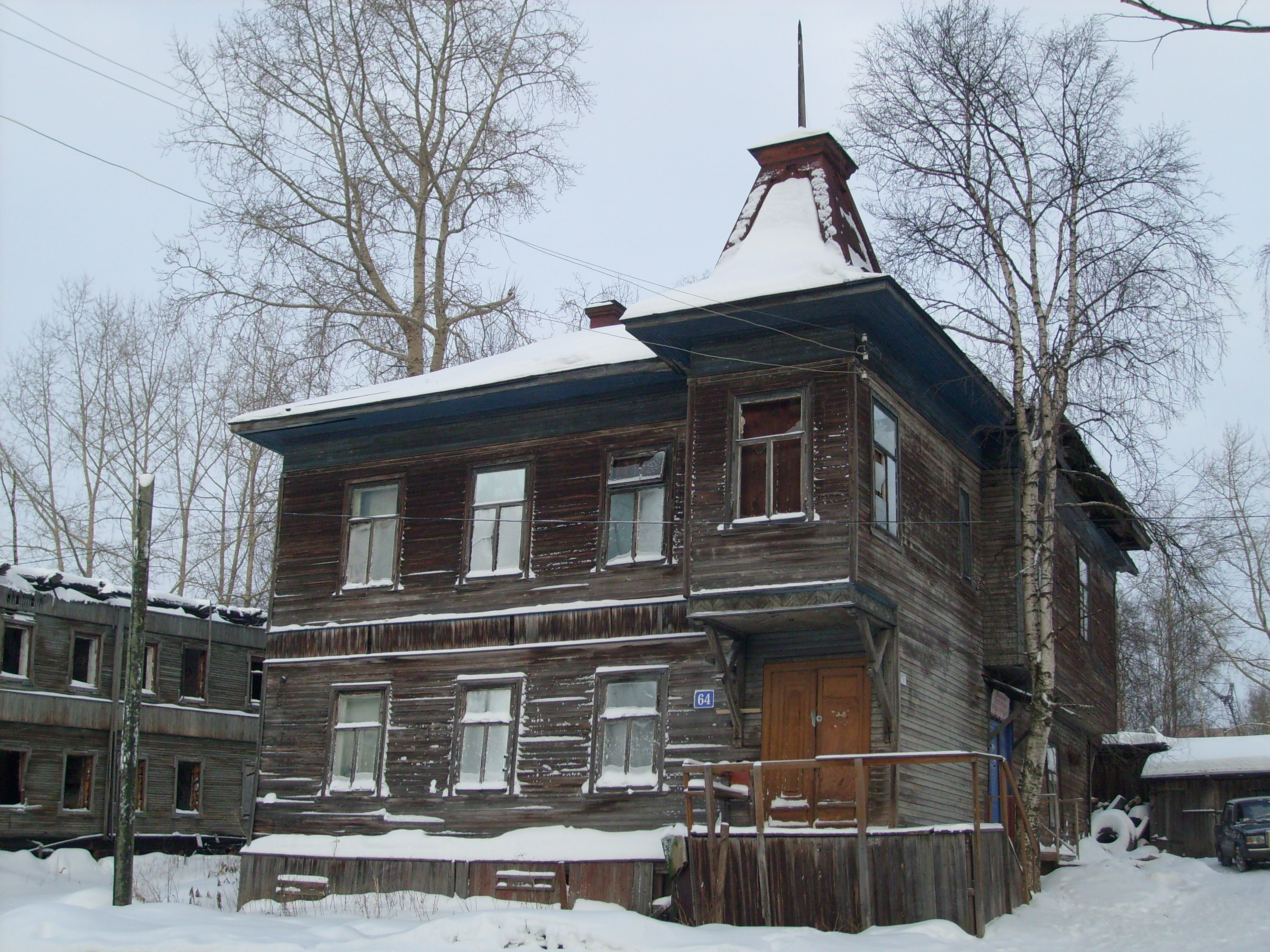 Архангельск, проспект Советских Космонавтов, 64. Дом Гринфельта П. Н., 1913.